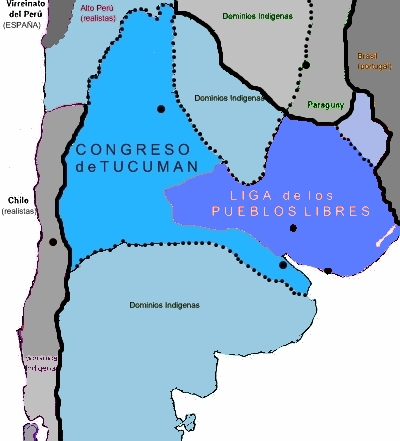 mapa de argentina en el momento de la declaracion de la independencia, por las provincias del congreso de tucuman, mas las provincias del congreso de oriente, o liga de los pueblos libres trabajo propio 2007 pruxo